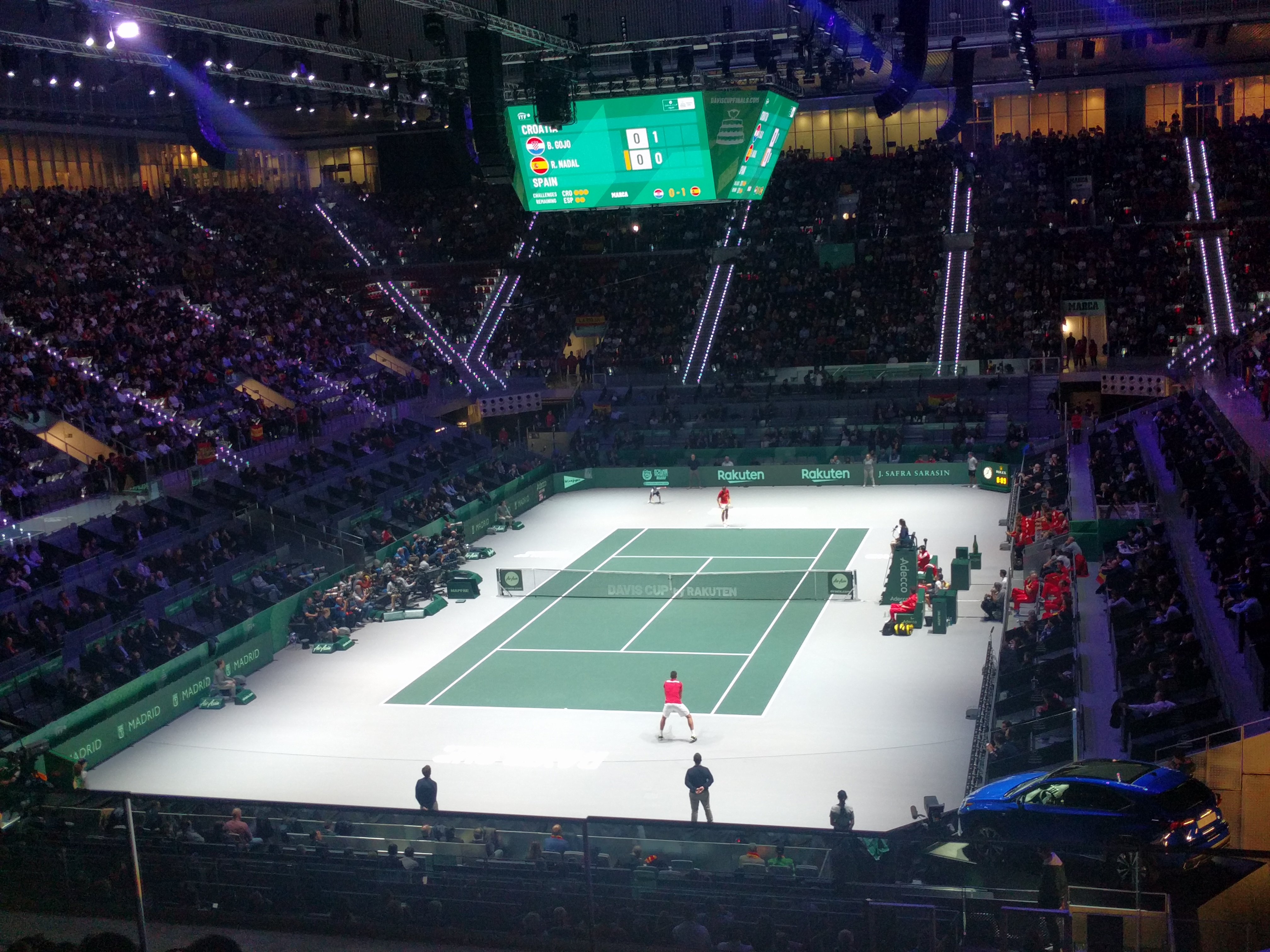 Partido de grupos de las finales de la Davis 2019